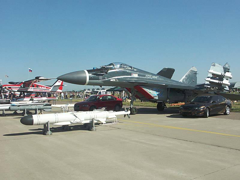 Russia MAKS-2005 MiG-29